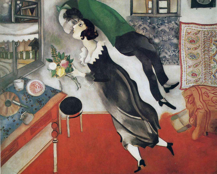 Марк Шагал «День рождения», 1915